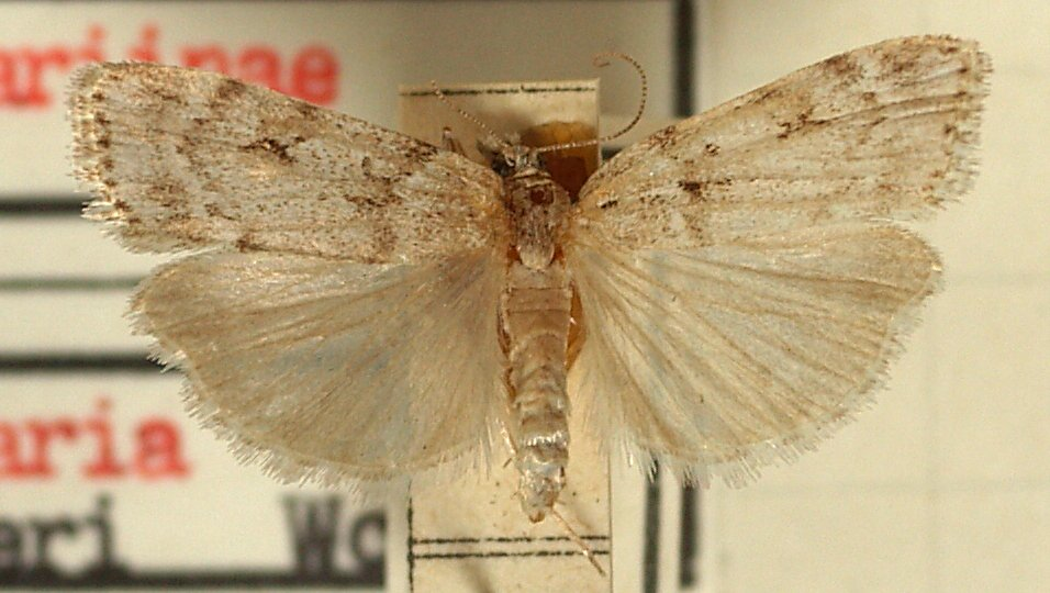 Scoparia subfusca